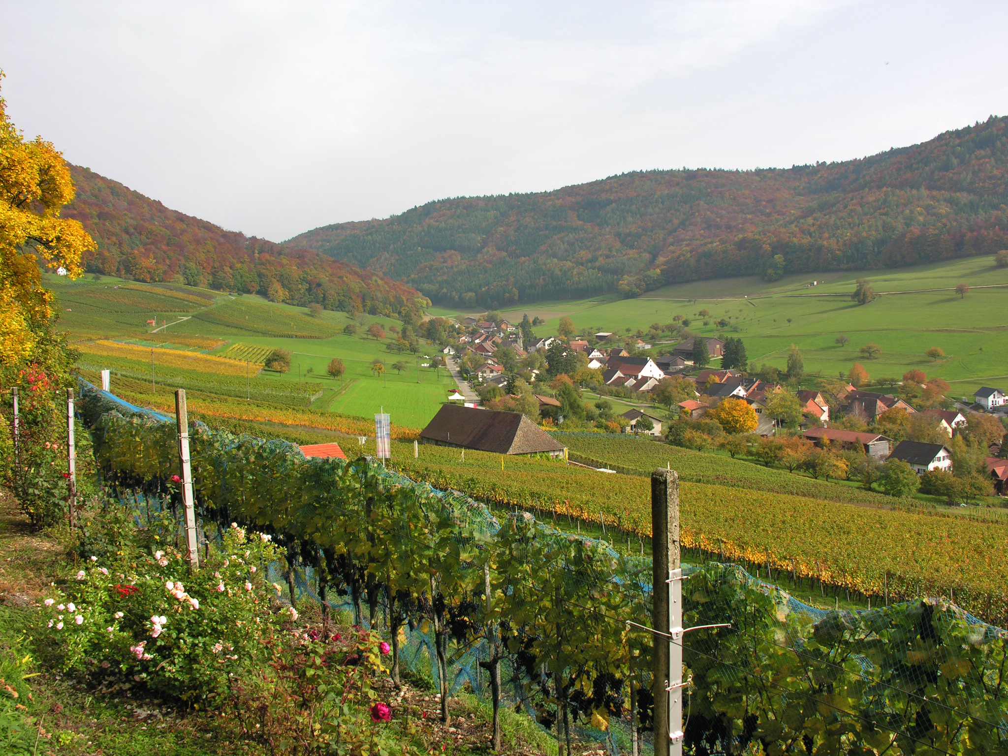 Switzerland, Canton of Schaffhausen, Osterfingen